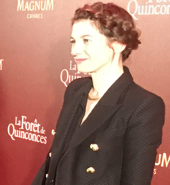 Amandine Truffy au 69ème festival de Cannes pour le film La Forêt de Quinconces